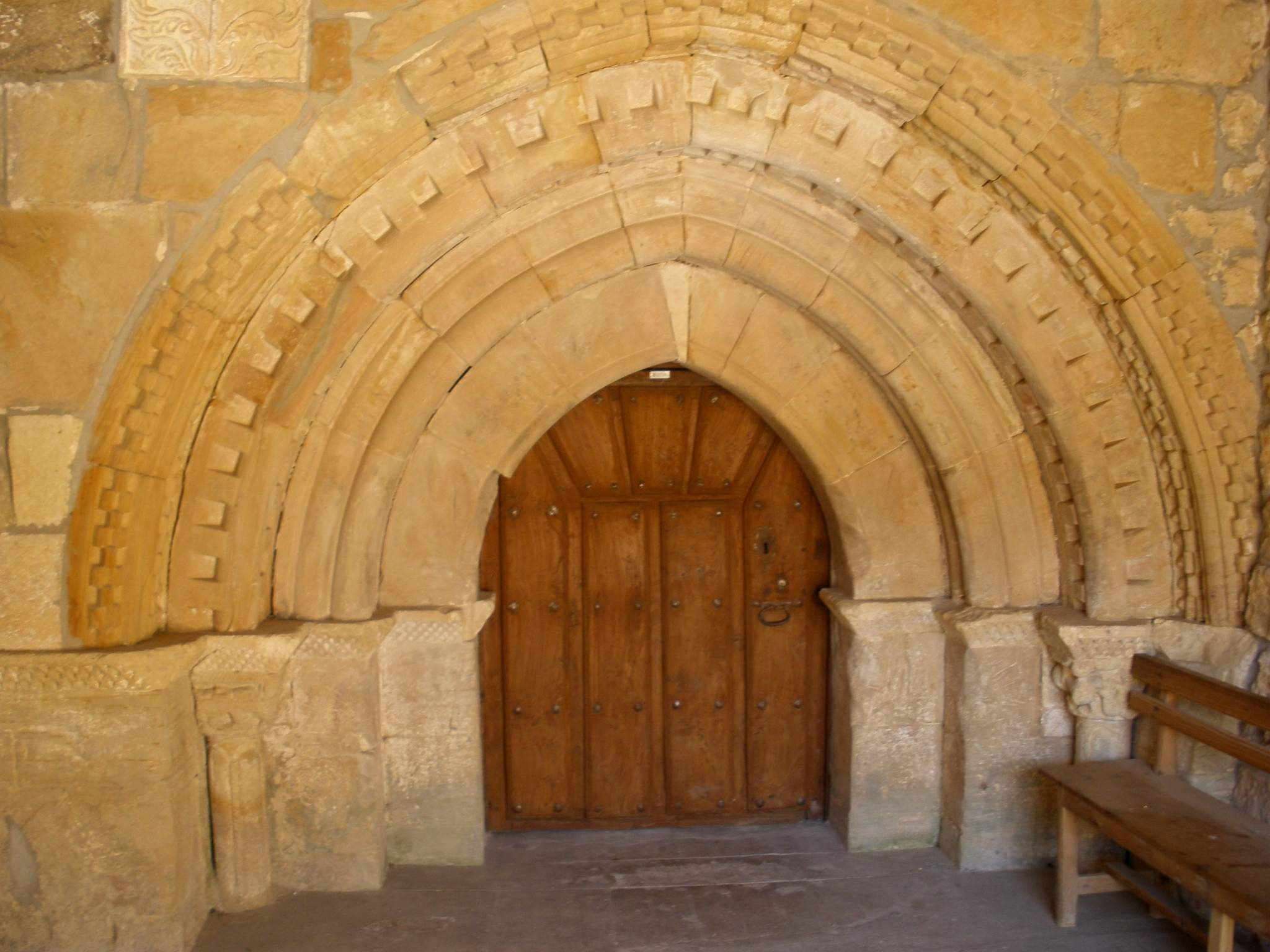 Hoyos del Tozo (Burgos) - Iglesia de la Santa Cruz